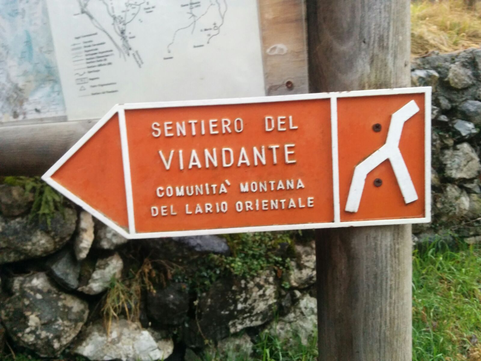 Il cartello metallico indica la direzione verso cui si sviluppa il Sentiero del Viandante a Lierna